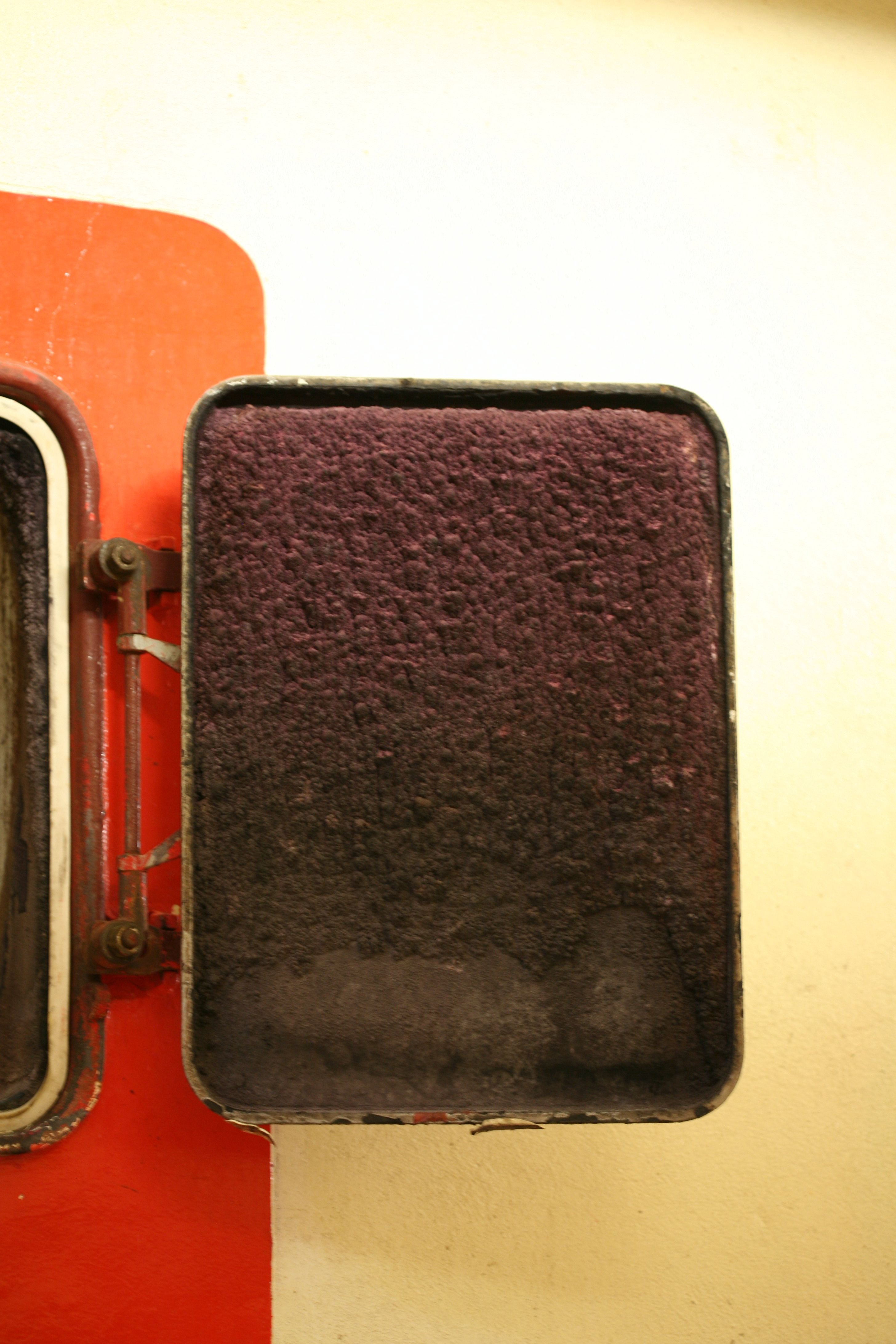 Plaque de tartre sur la porte d'une cuve en béton - cave à Beaumes-de-Venise, Vaucluse, France